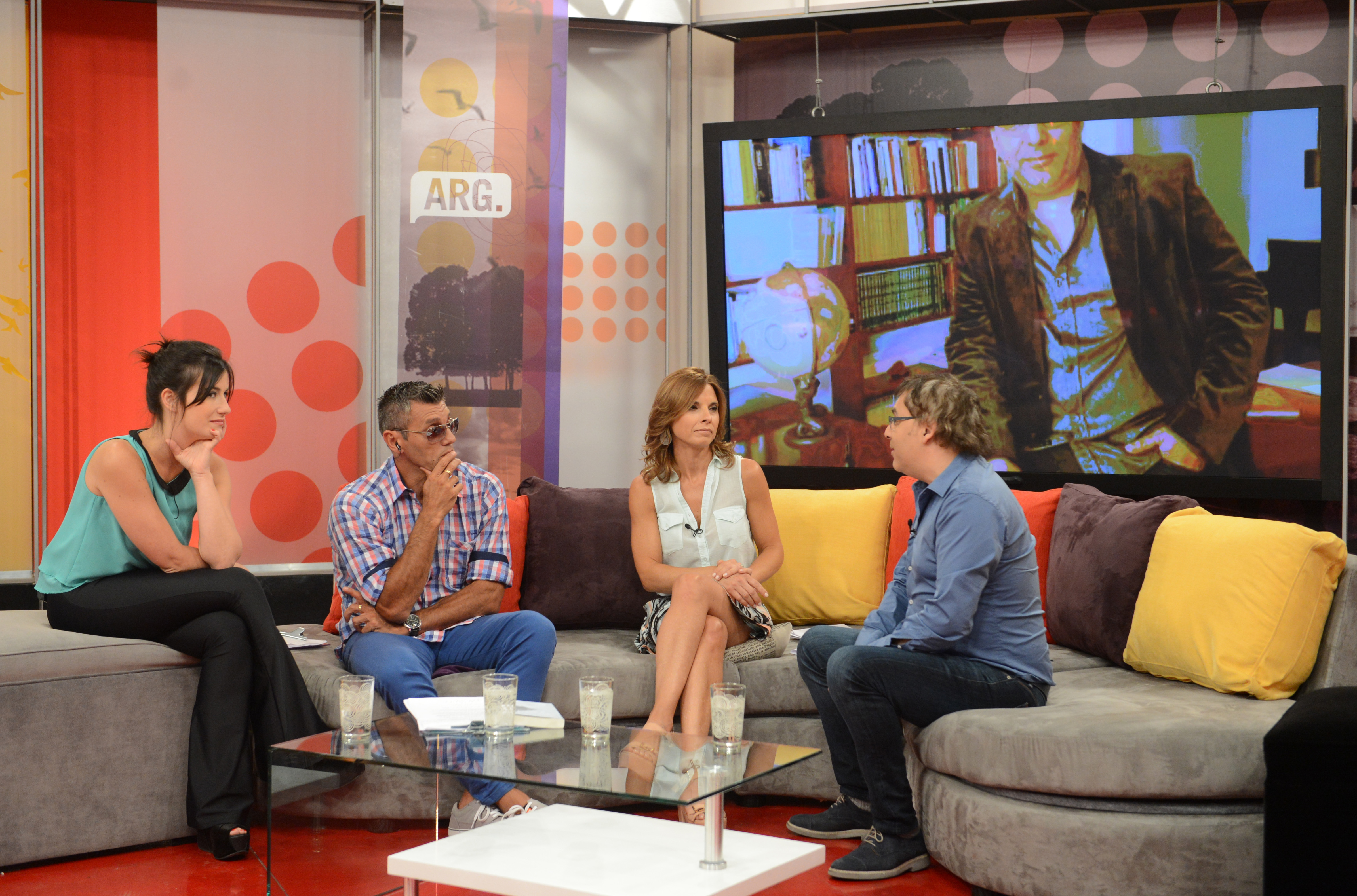 Gabriel Rolón invitado de Vivo en Argentina. 27.11.2014. Foto TVP 2014